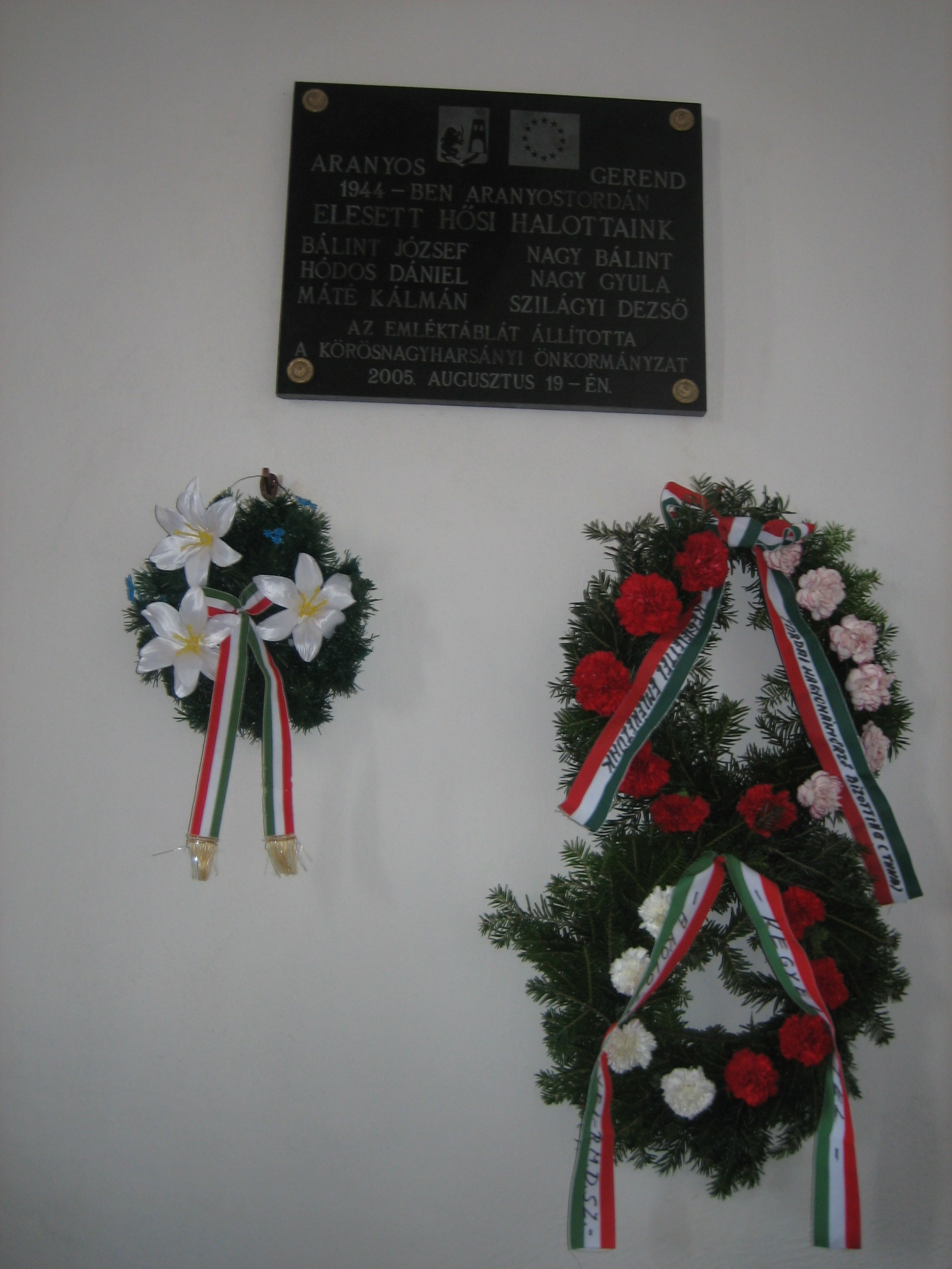 A körösnagyharsányi önkormányzat által emelt tábla az aranyosgerendi református templomban